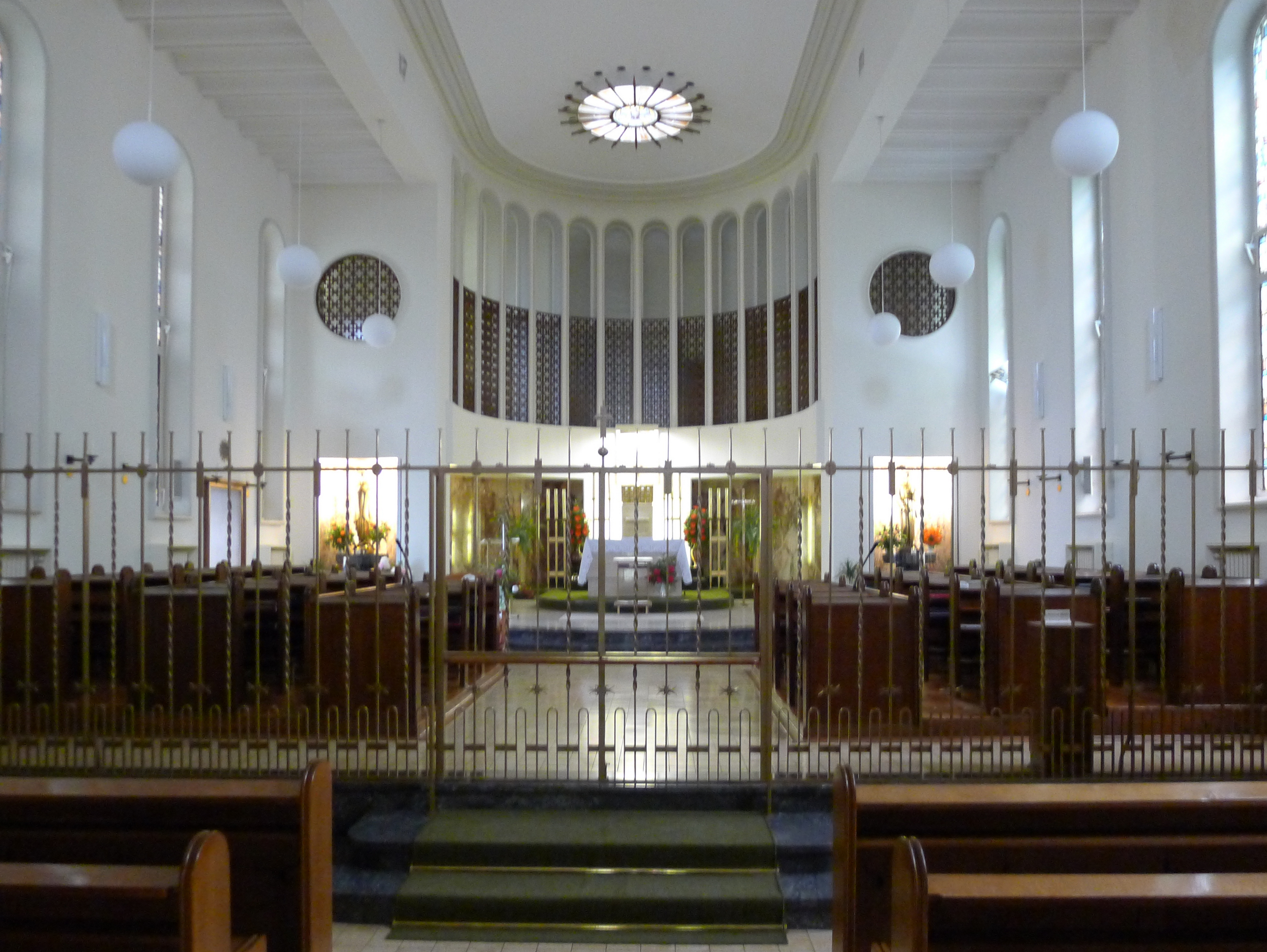 Innenraum der Kirche